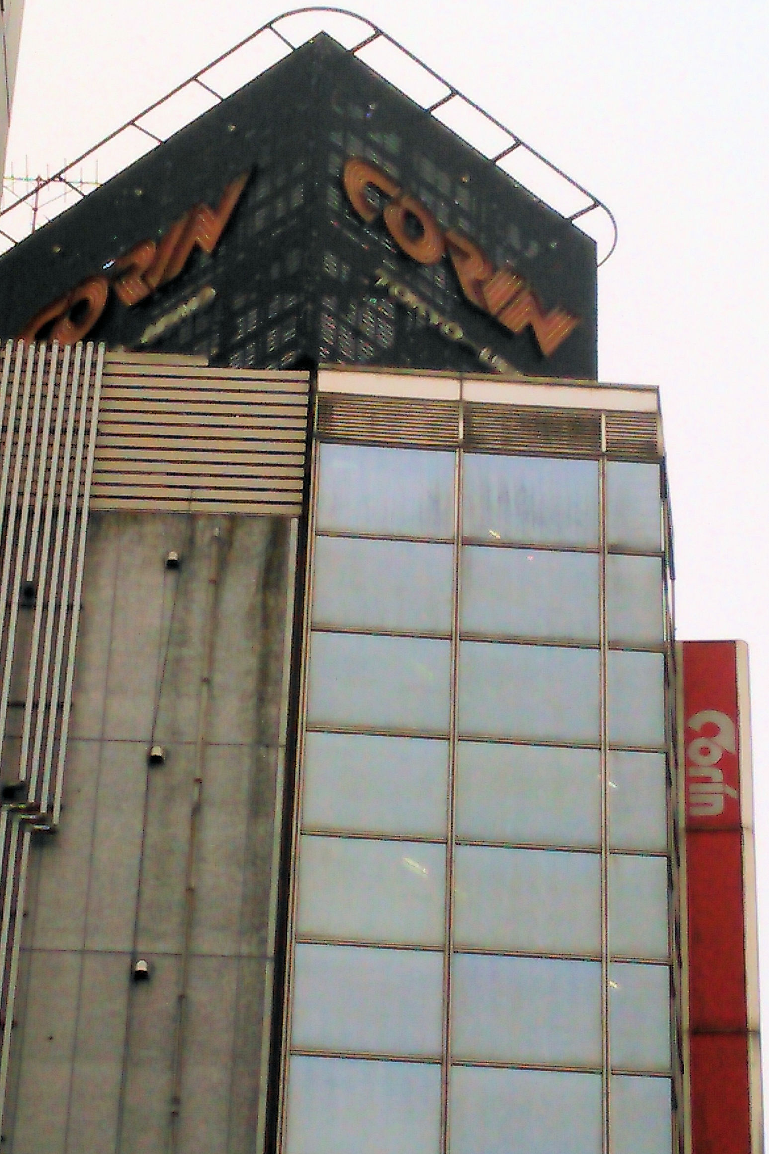 光輪モータス店舗跡